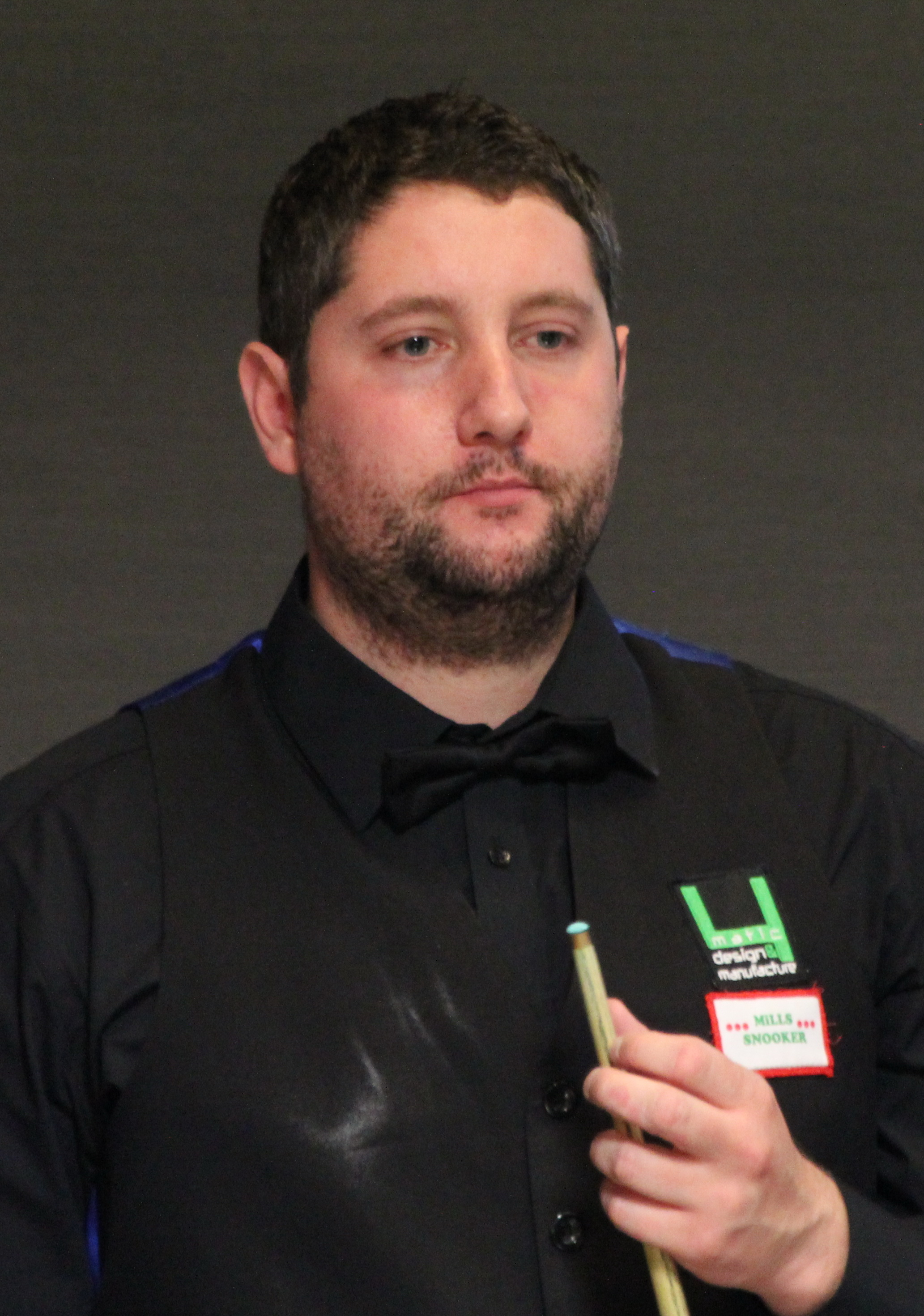 Stuart Carrington beim Paul Hunter Classic 2016